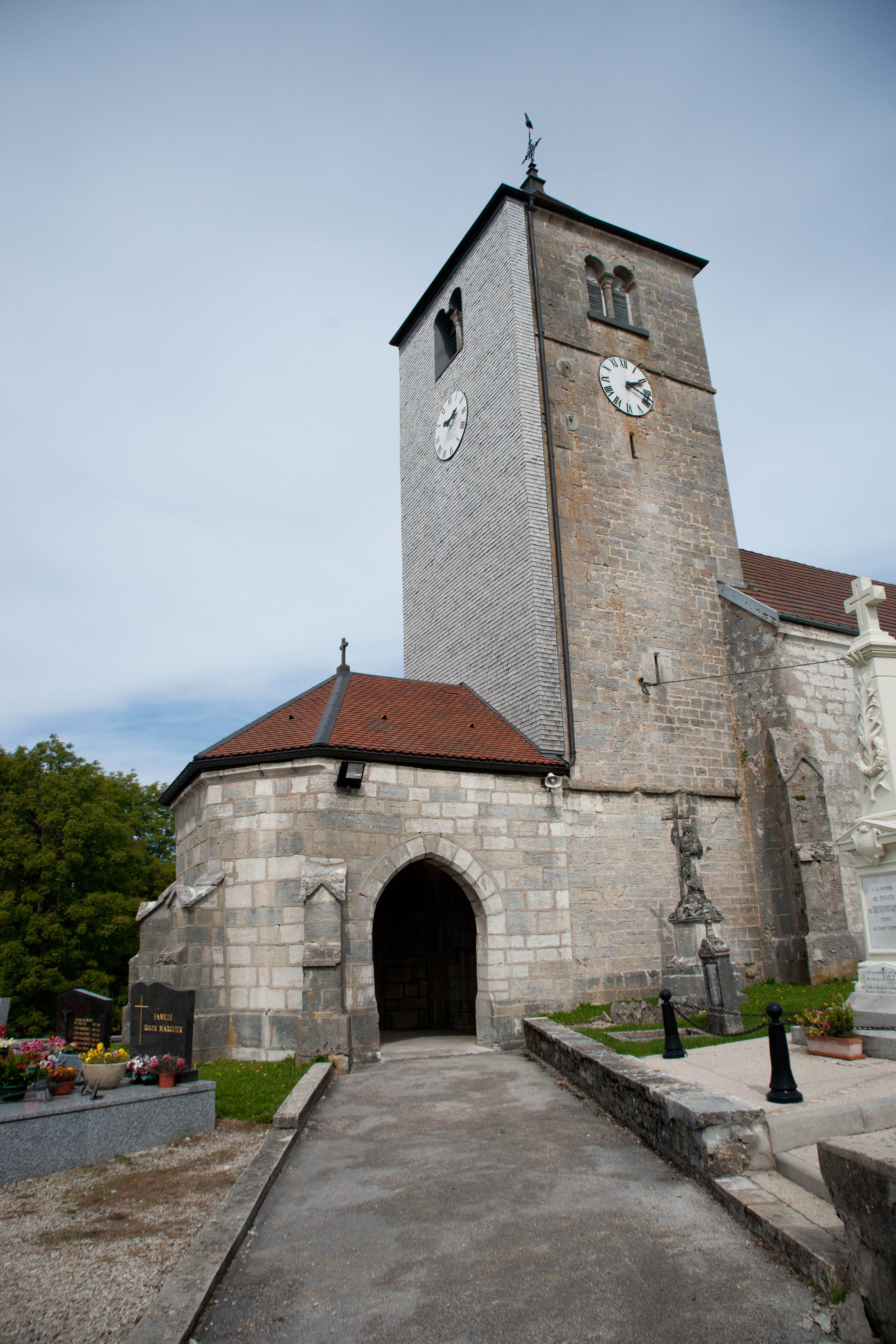 Église Saint-Nicolas de Septfontaines .